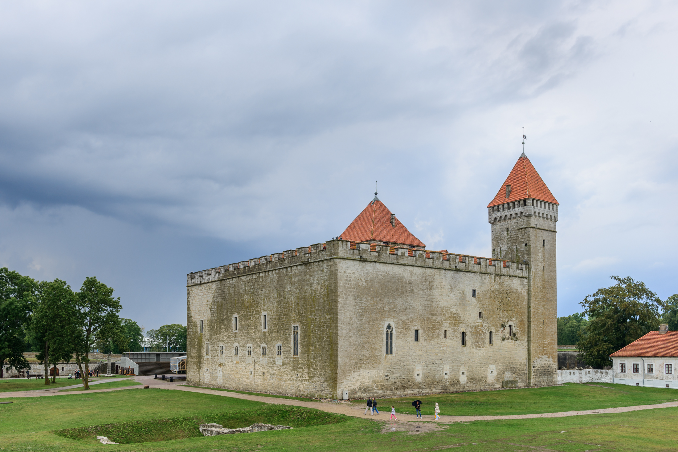 Kuressaare linnus